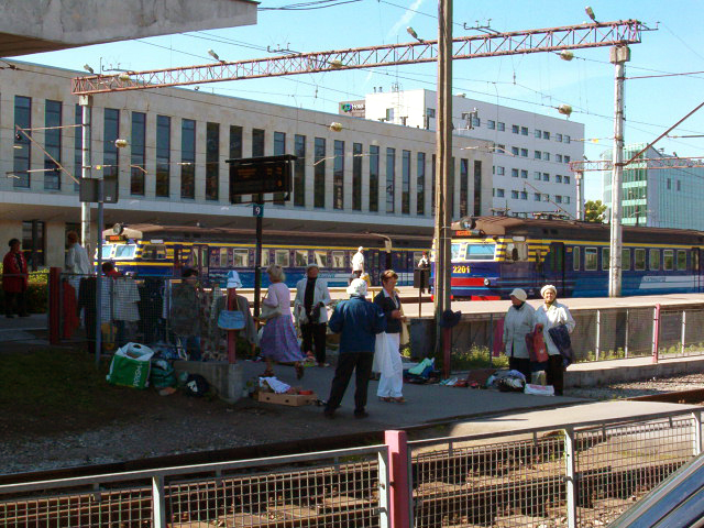 Vaade Balti jaamale põhjast, Kopli tänava poolt